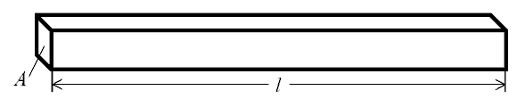 Quader mit Querschnitt A und Länge l